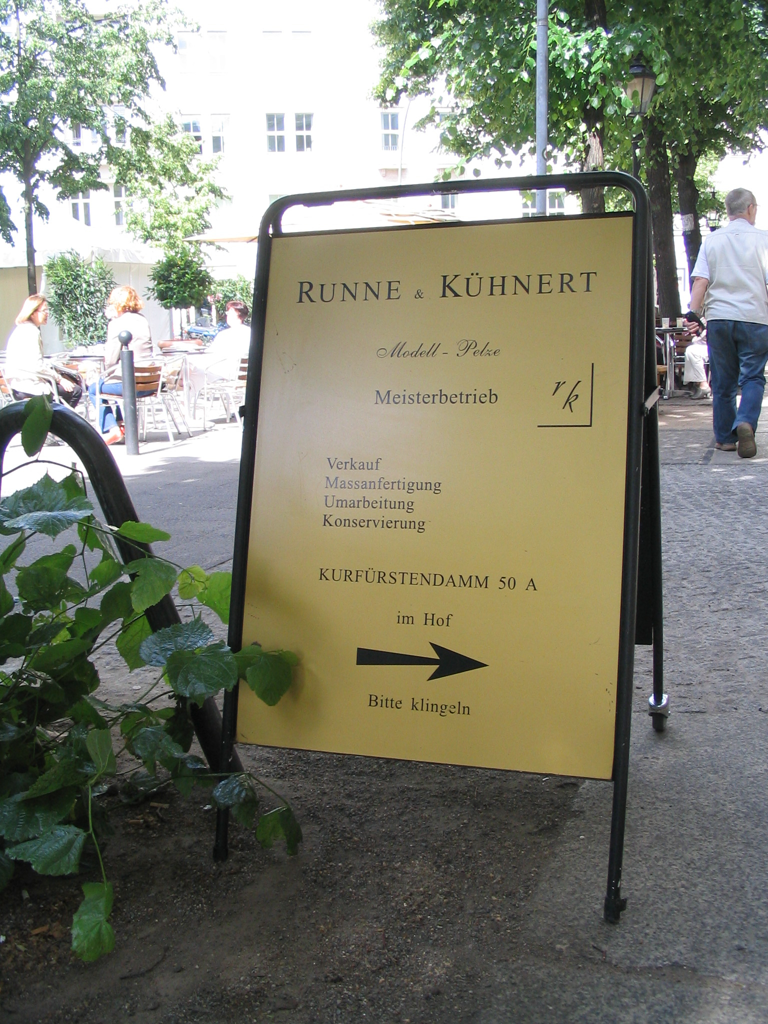 Runne & Kühnert Modell-Pelze OHG, Kurfürstendamm 50 A, 10707 Berlin-Charlottenburg, Kurfürstendamm 50 A, Deutschland